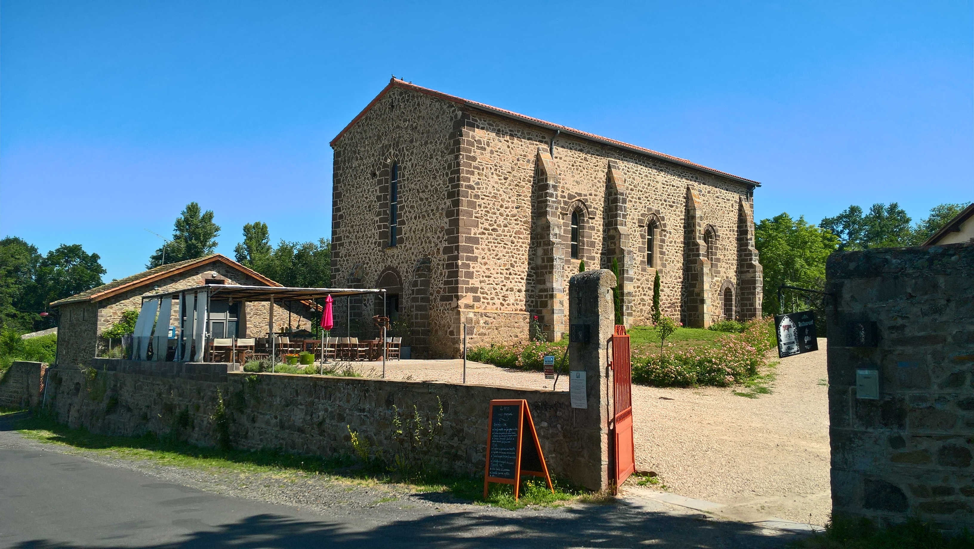 Vieille-Brioude, la léproserie de la Bajasse transformée en restaurant .